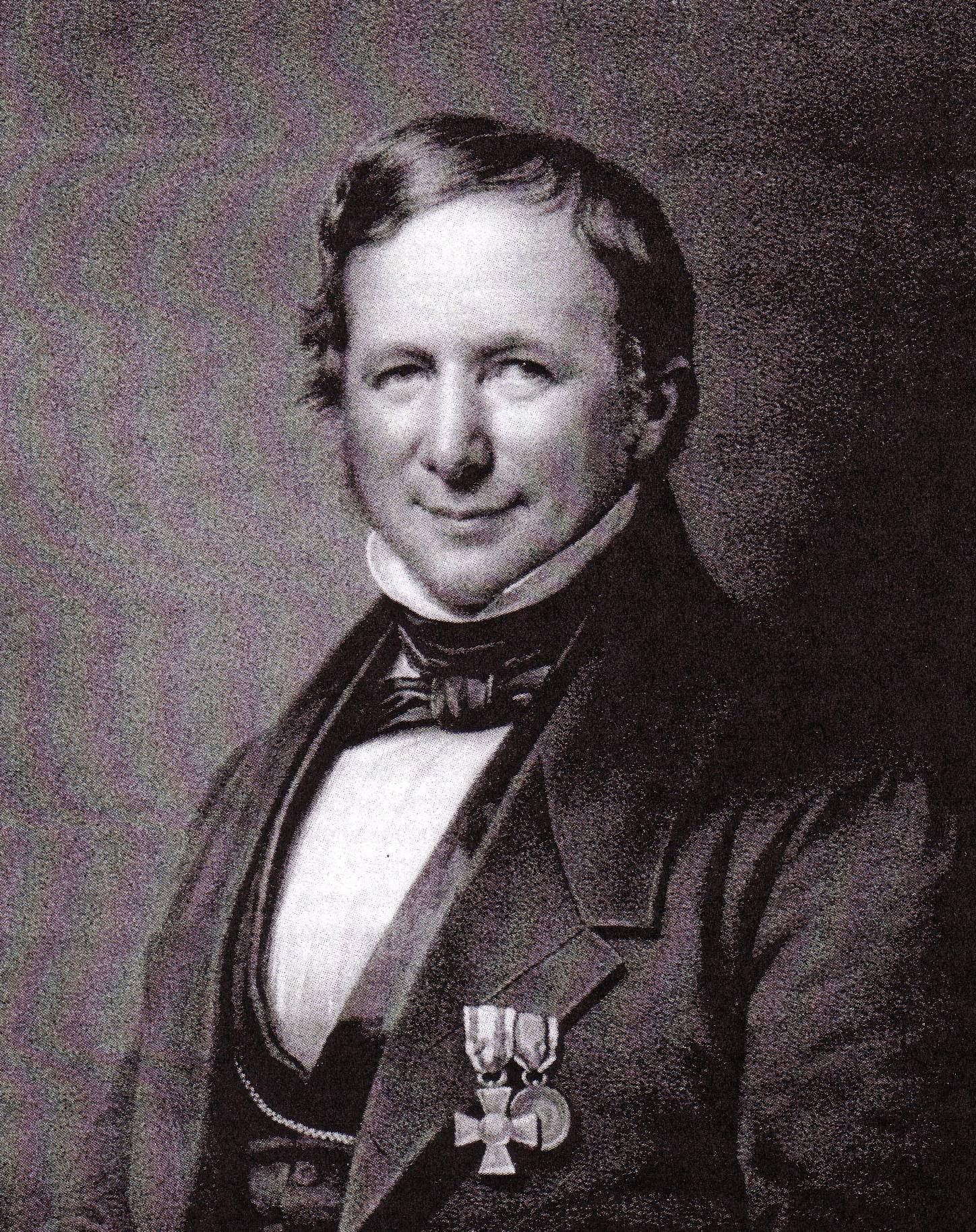 Albrecht Philipp Thaer (1794-1863), Direktor d landwirtschaftl Akademie in Möglin